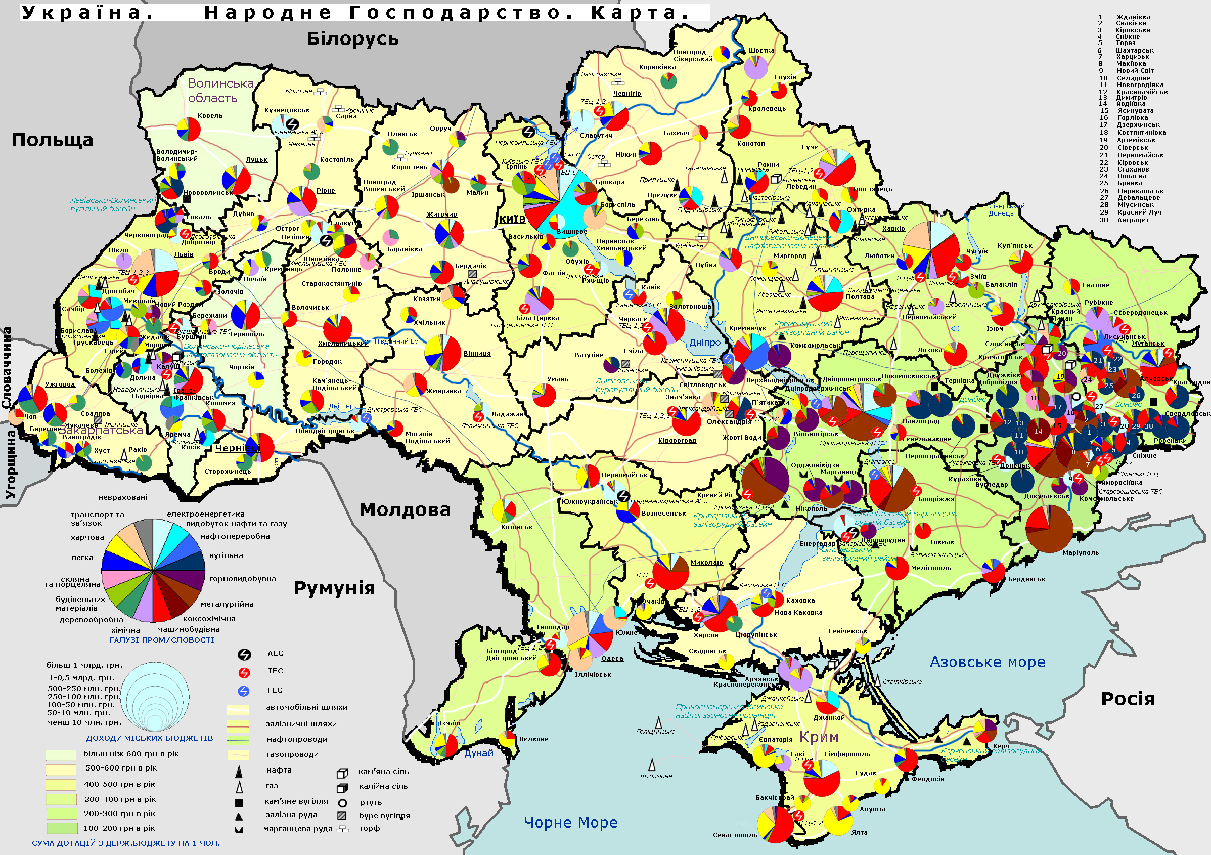 map